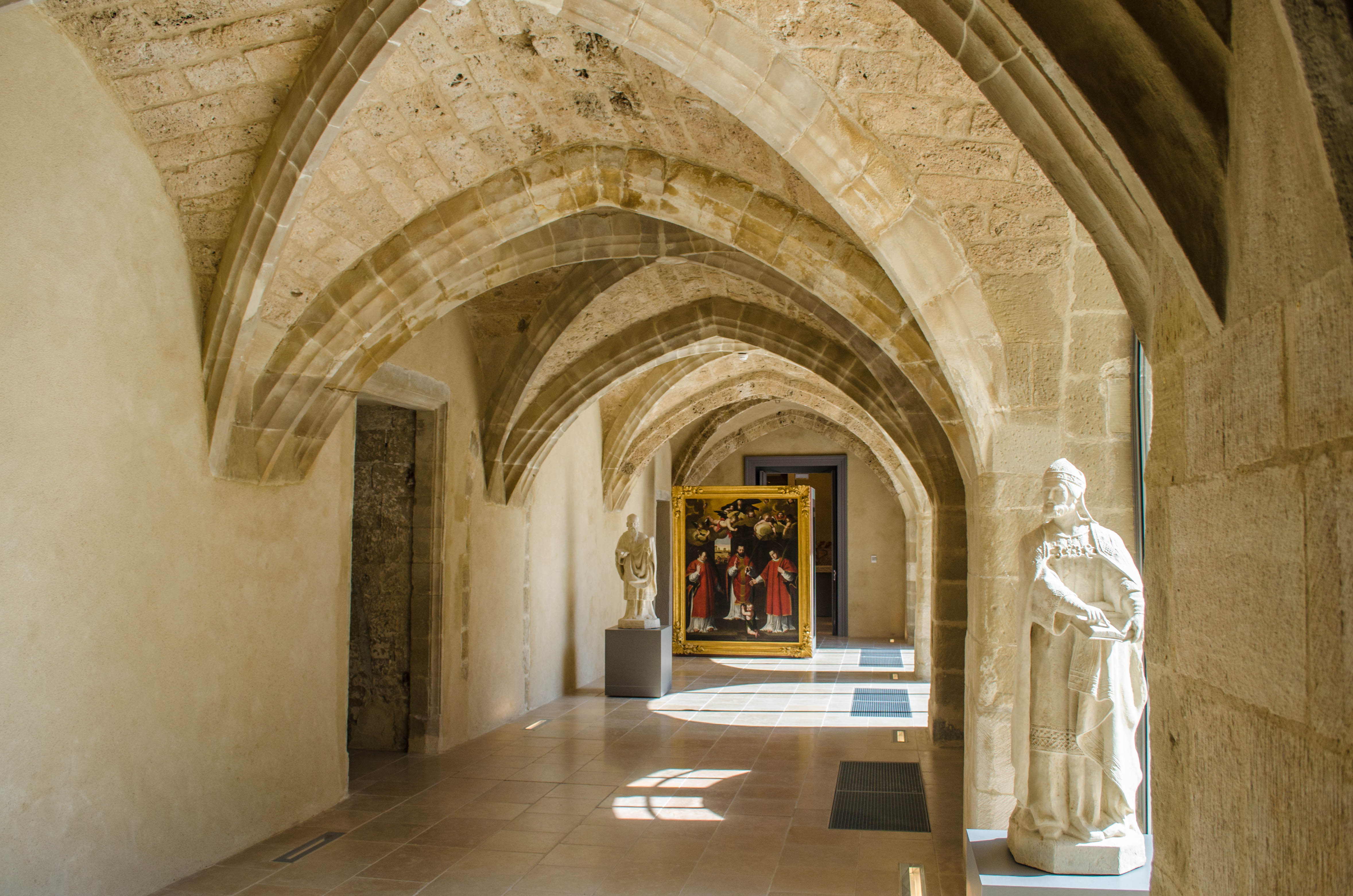 Valence, Drôme, France. Musée des beaux-arts : galerie de l’ancien cloître